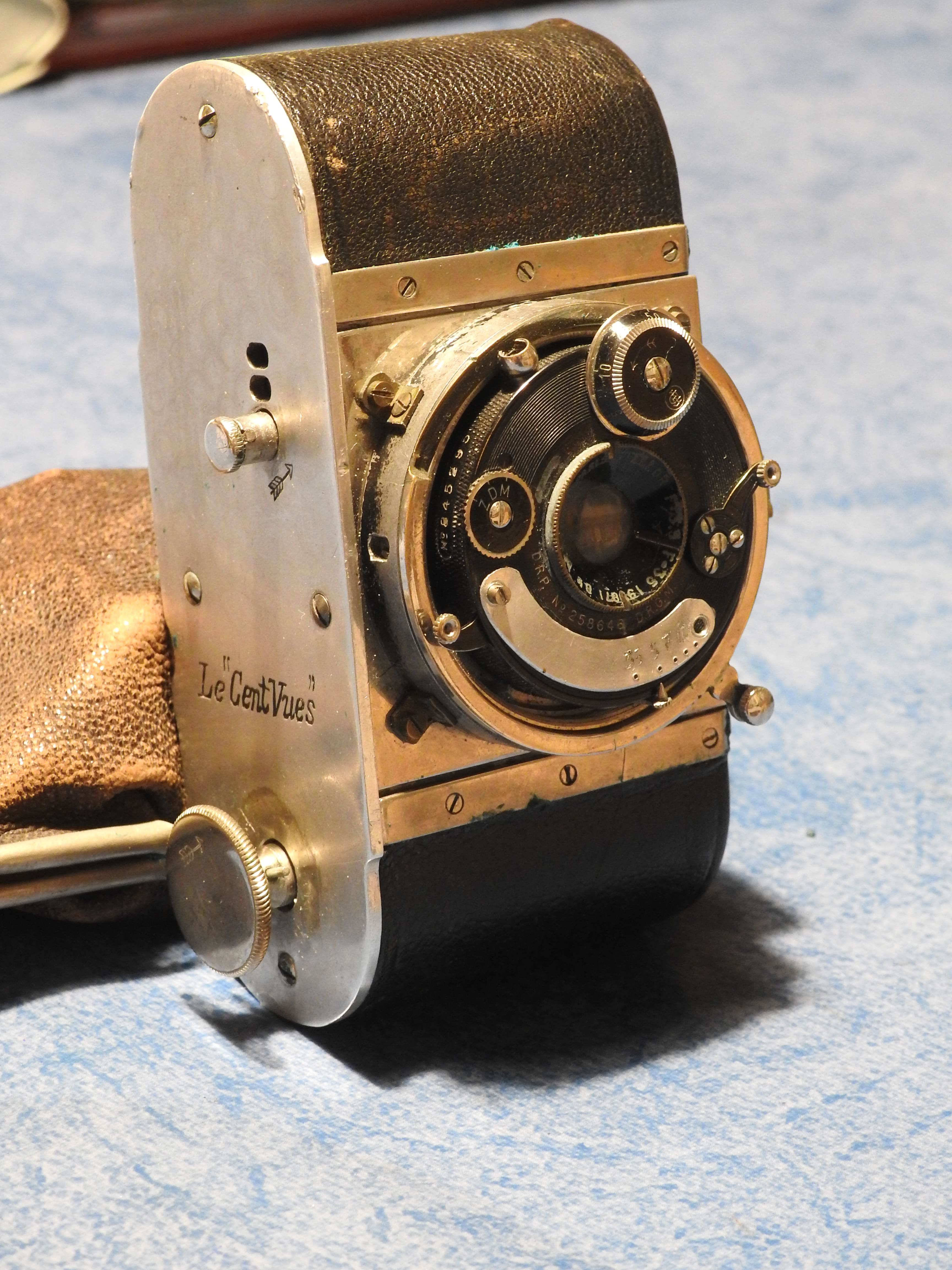 Le Cent-Vues, appareil photo de format 18x24 mm conçu par Étienne Mollier en 1909.